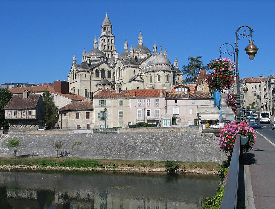 Périgueux, Cathédrale Saint-Front, France, Frankreich (30. August 2005) Photograph: Luidger